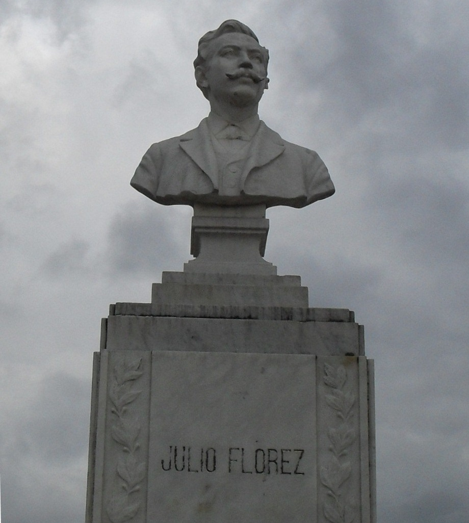 Busto del poeta Julo Florez en el parque de su mismo nombre en la ciudad de Chiquinquirá, Boyacá, Colombia